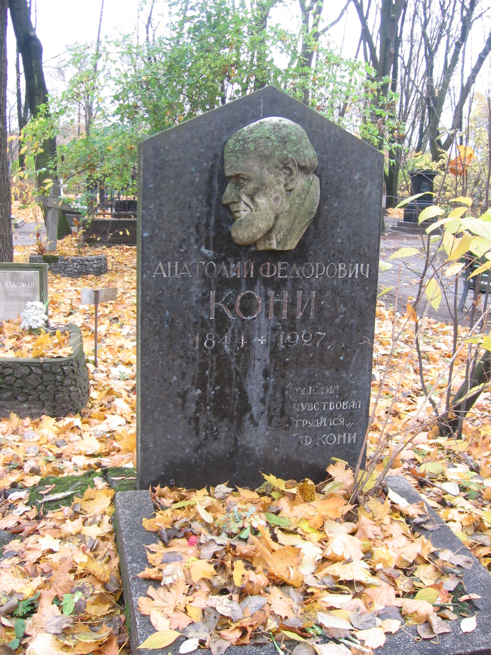 Надгробие А. Ф. Кони на Литераторских мостках